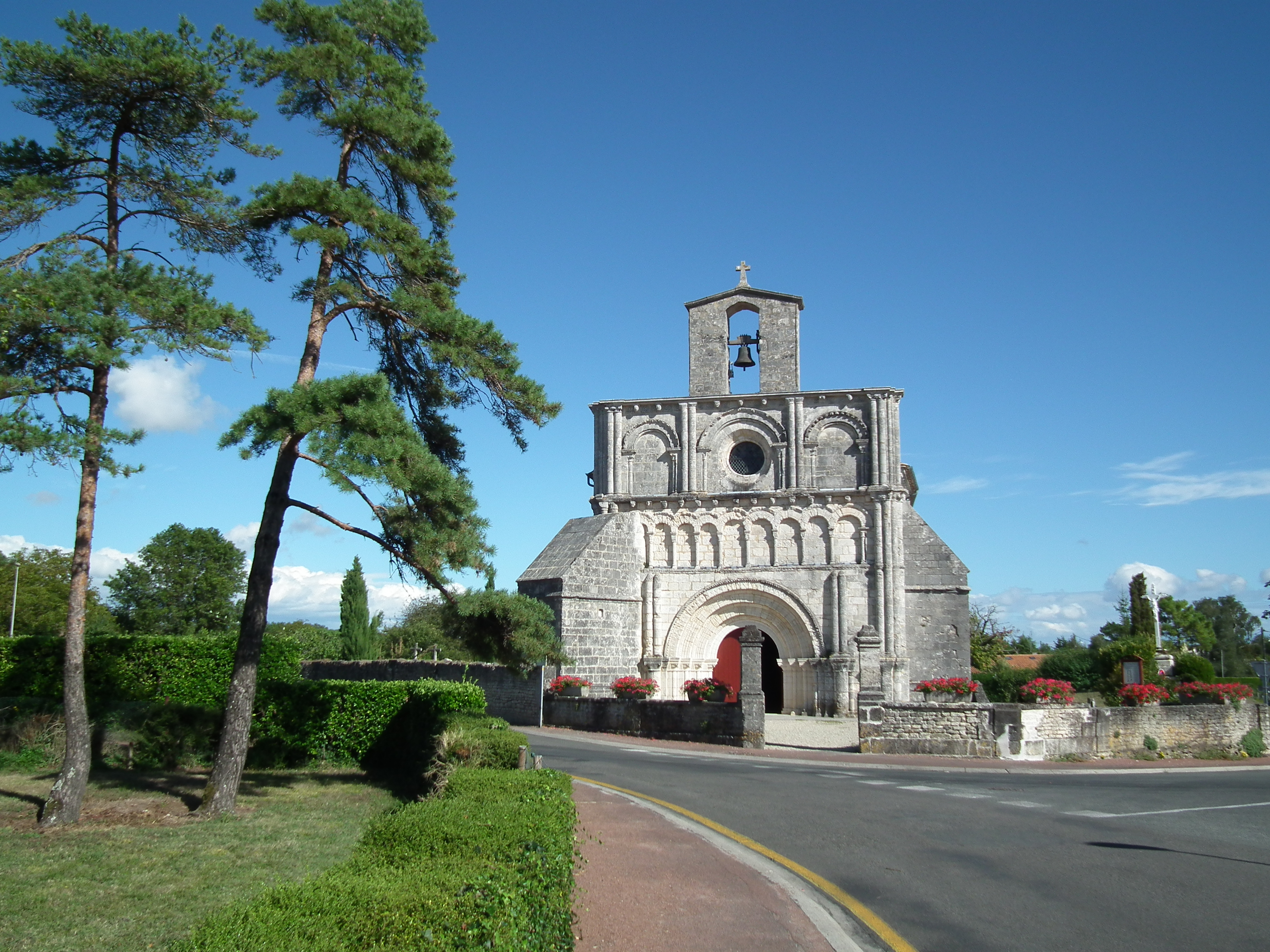 Le carrefour de l'église à Breuillet